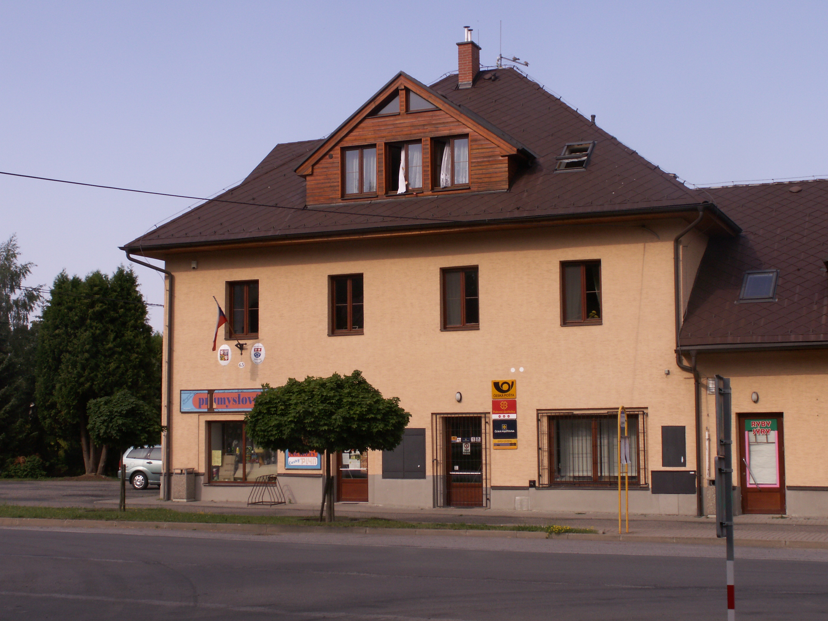 Nová Ves u Chotěboře, okres Havlíčkův Brod, budova obecního úřadu